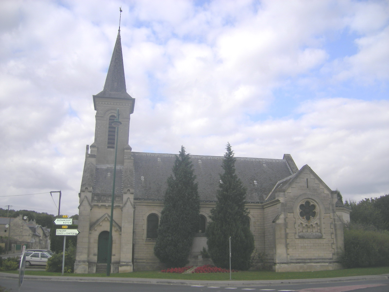 Vézaponin